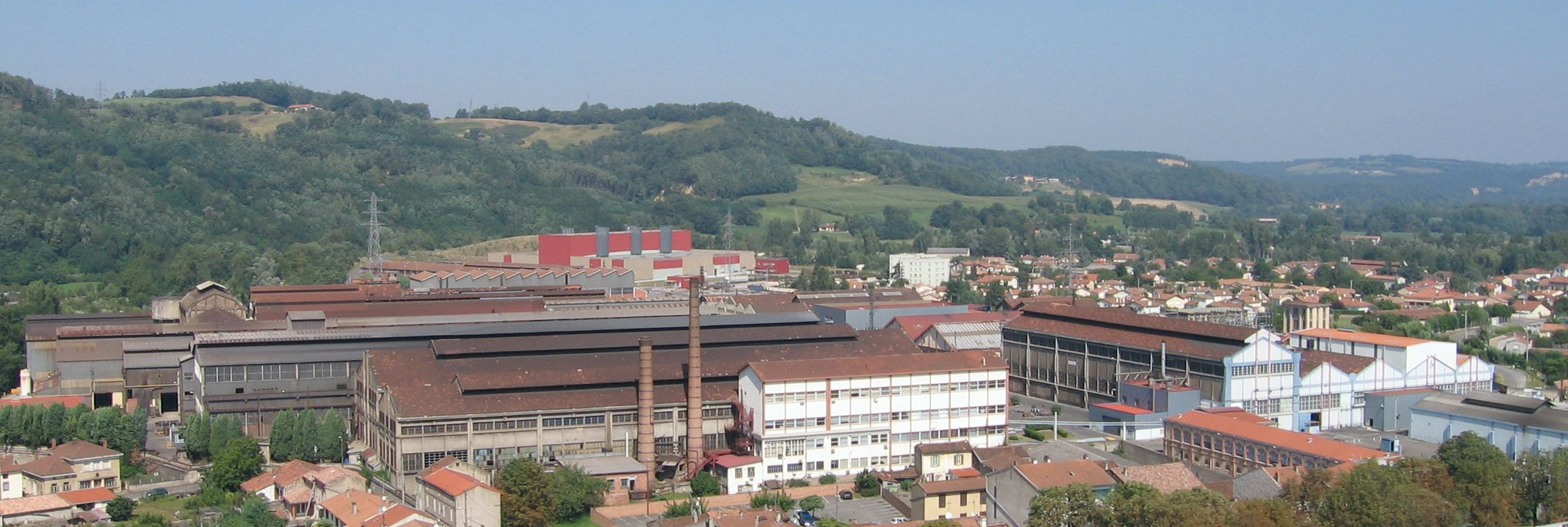 Usine métallurgique de Pamiers (Ariège, Midi-Pyrénées, France).